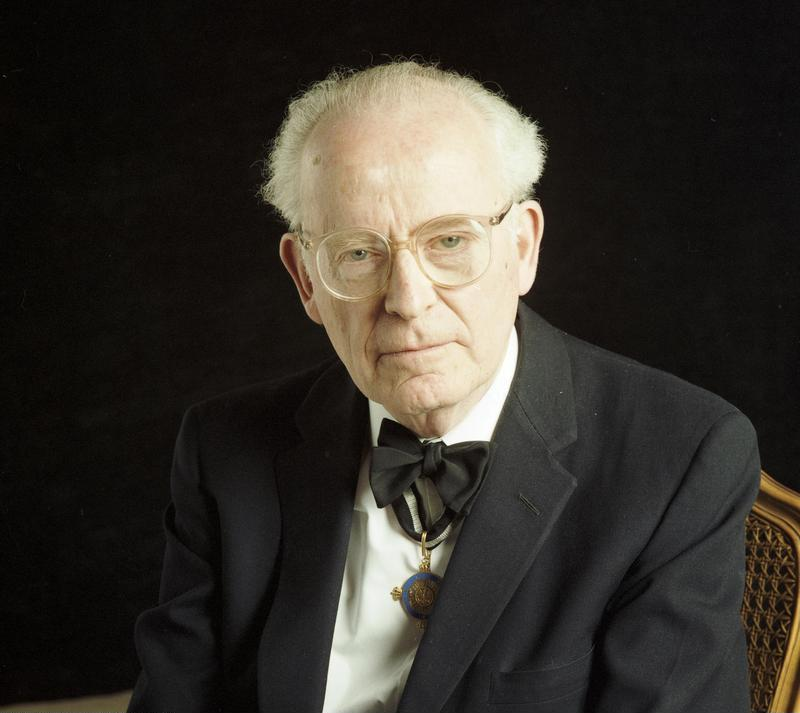 6.6.1988 Prof. Dr. Ernst Kitzinger (USA) Kunsthistoriker Mitglied des Ordens Pour le Mérite für Wissenschaften und Künste